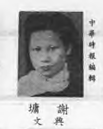 第一屆國民大會四川省興文縣代表謝墉